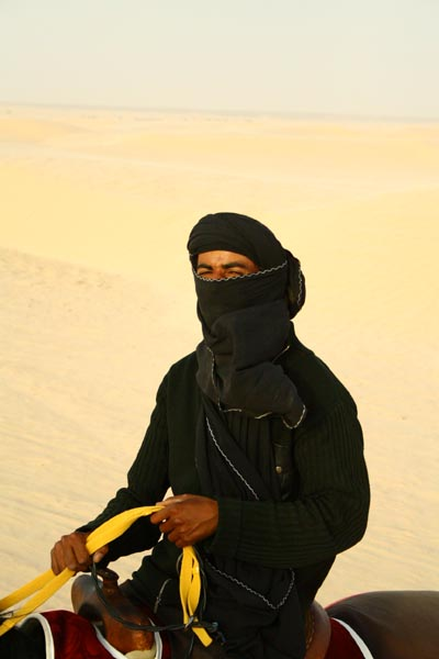 Berber (Tunisia)